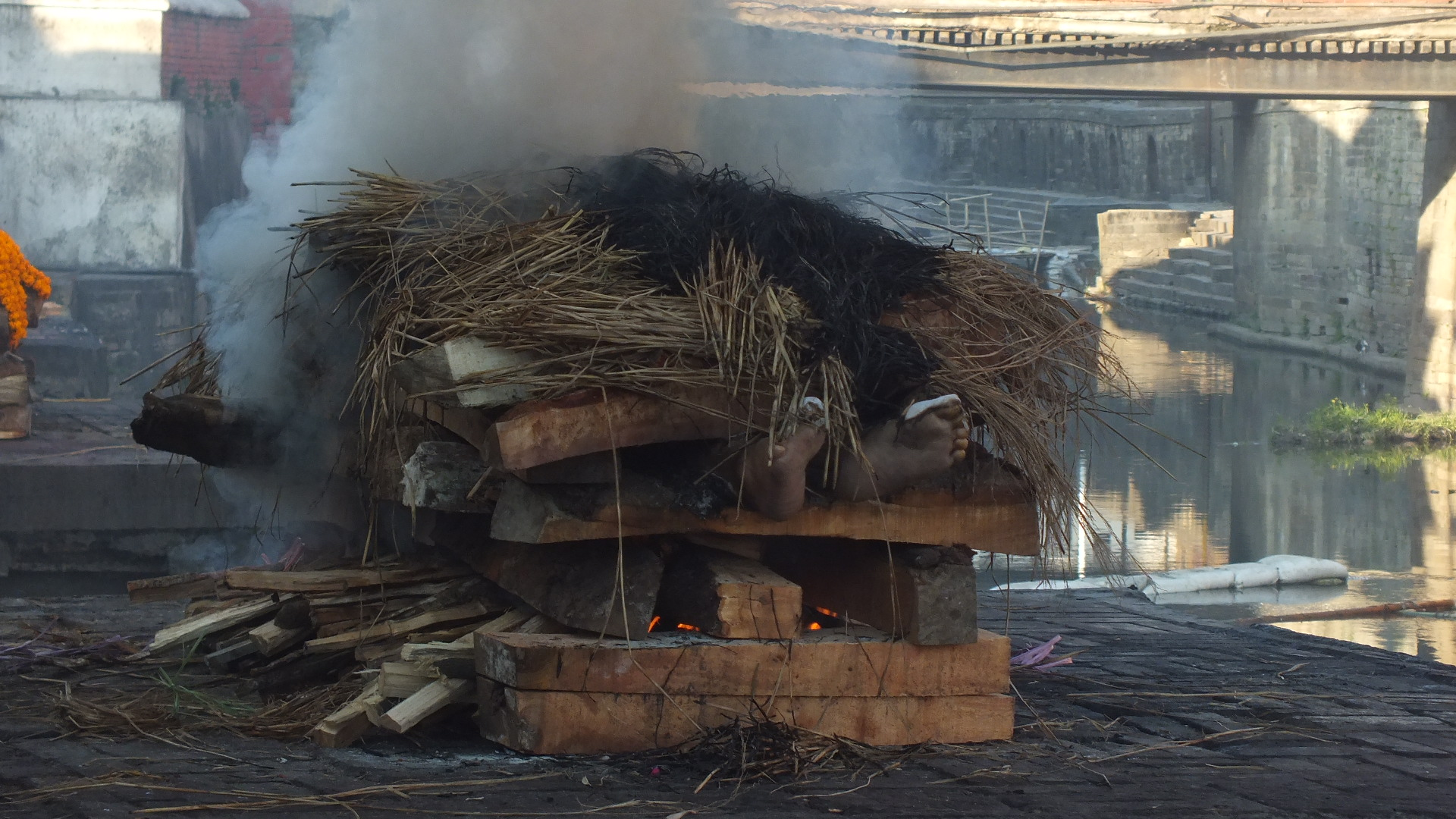 Bagmati River, Pashupatinath, Nepal バグマティ川とパシュパティナート火葬場